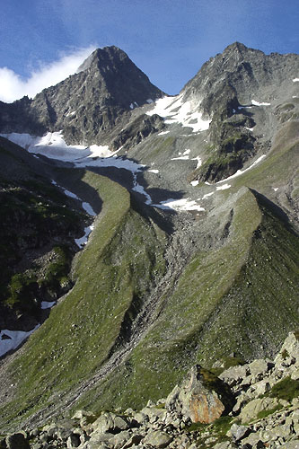 Der Piz Nair (3059 m)